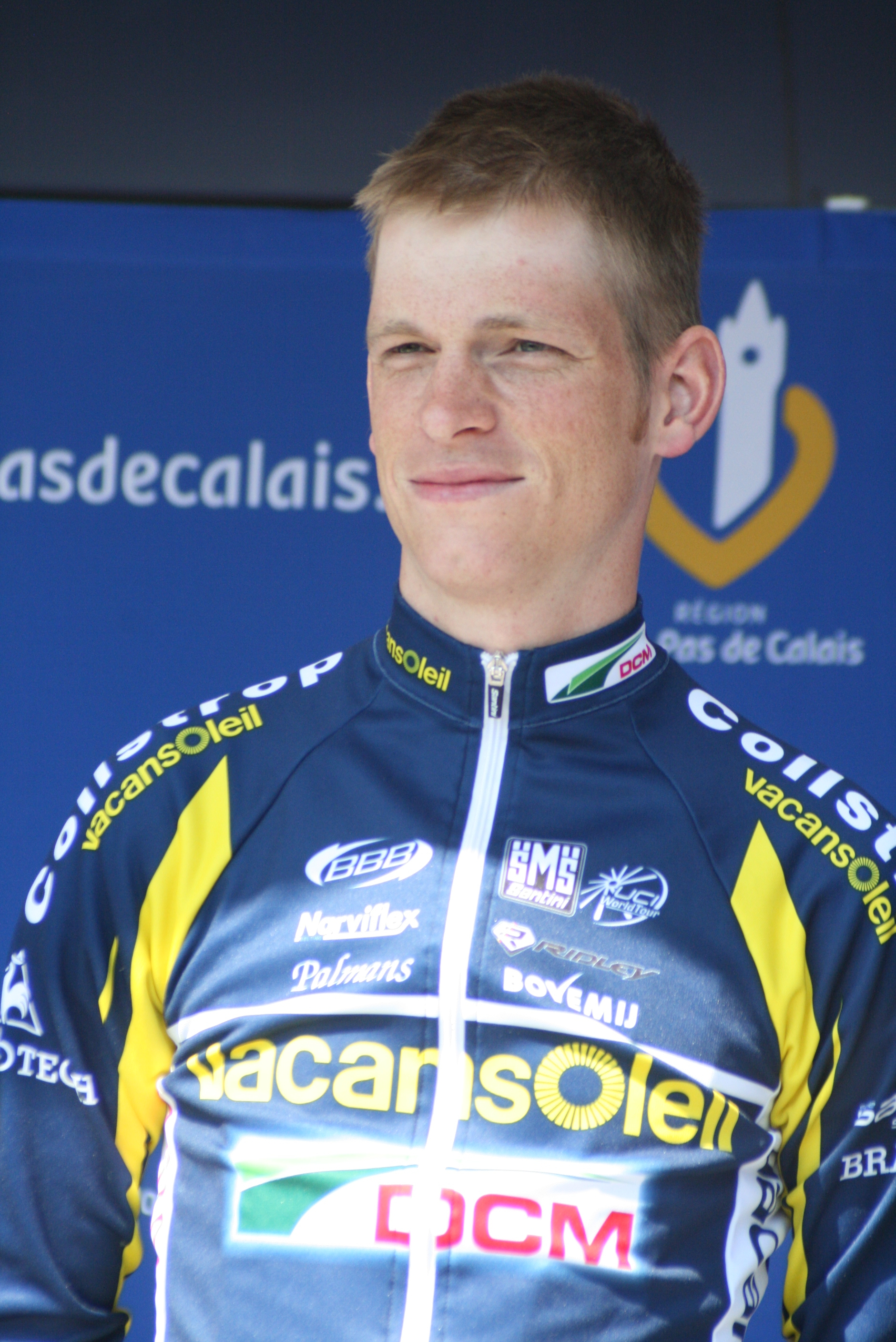 Présentation des coureurs au départ de la première étape Joost Van Leijen